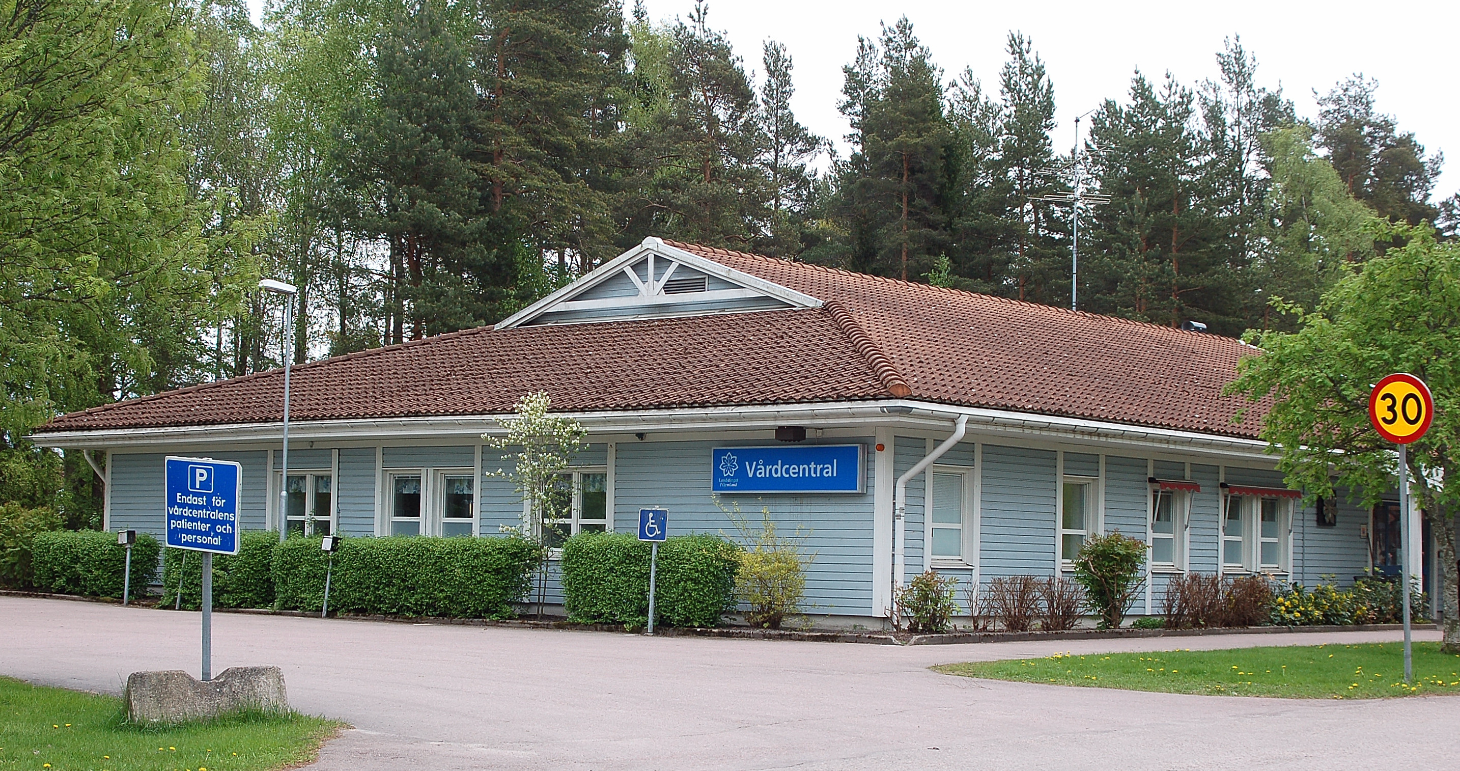 Lövnäs Vårdcentral, Hammarö.